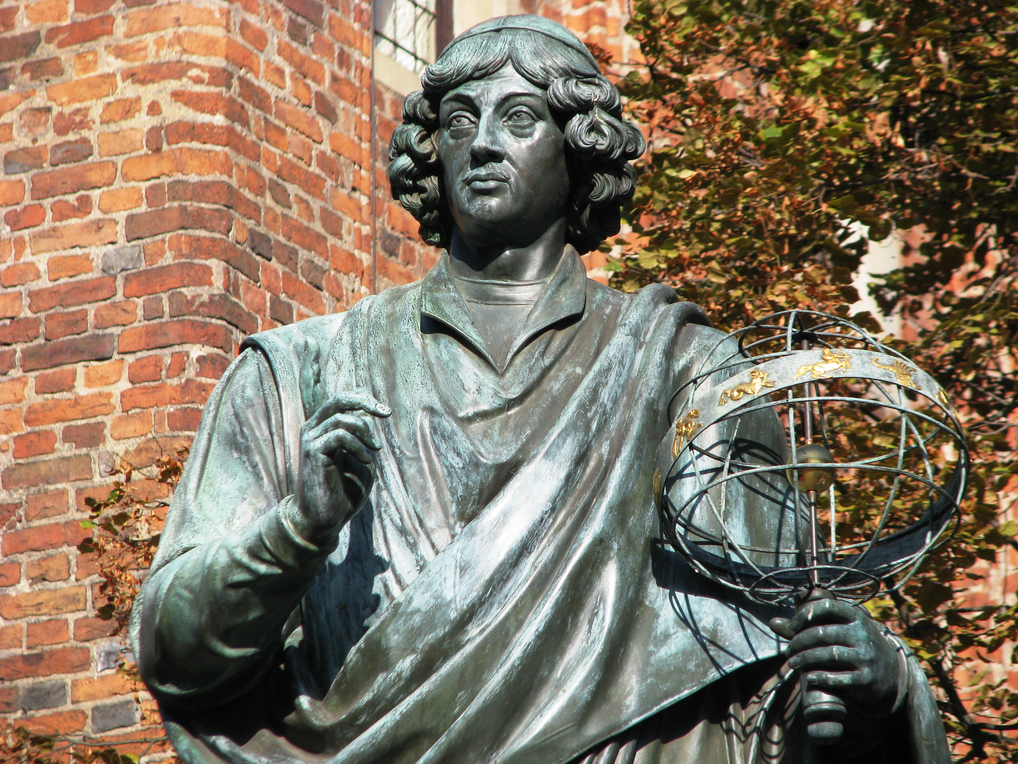 Toruń - Pomnik Mikołaja Kopernika w zespole Rynku Staromiejskiego